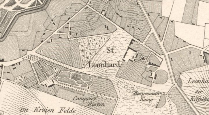 St. Leonhard bei Braunschweig um 1835.